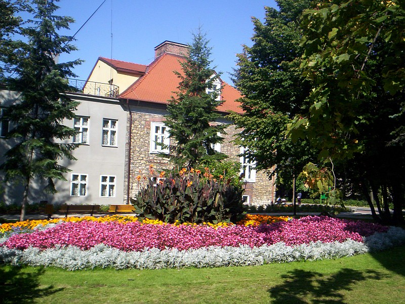 Town Museum, Chrzanow, Poland. a i owszem jest to Muzeum ale nigdy to nie był dwór lecz jego t/w czworaki a dwór właściwy znajdował się głębiej bliżej ulicy śląskiej!!!